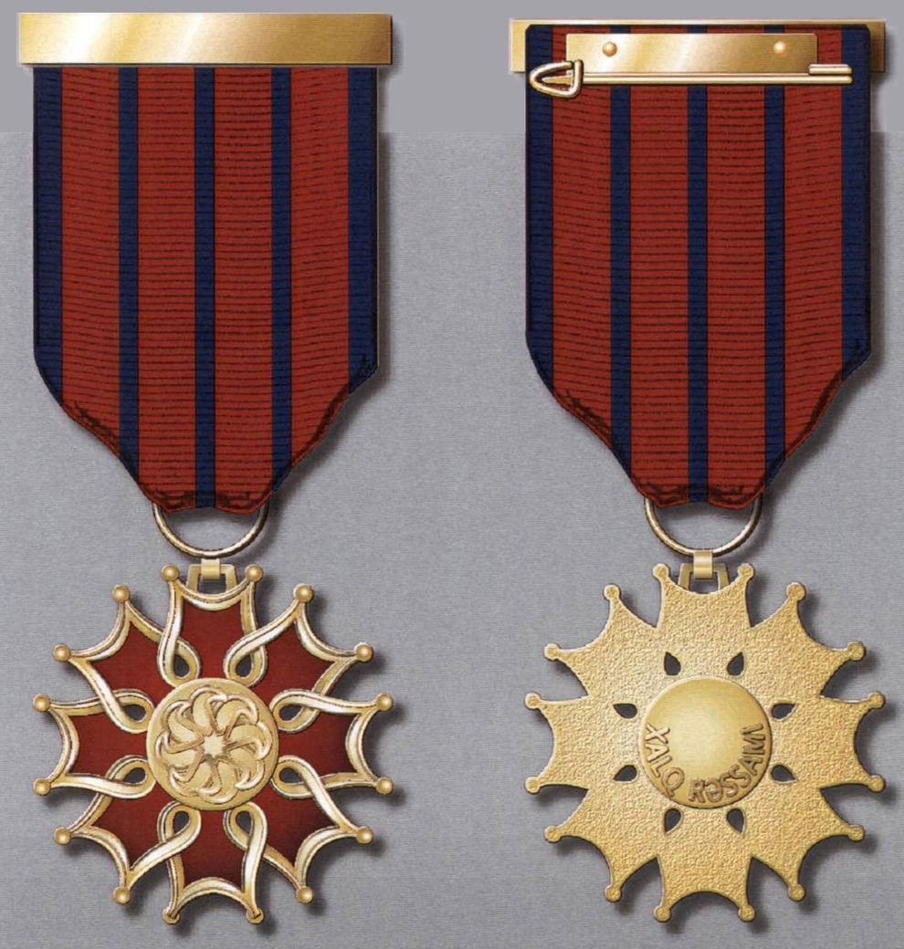 “Xalq rəssamı” fəxri adının döş nişanı